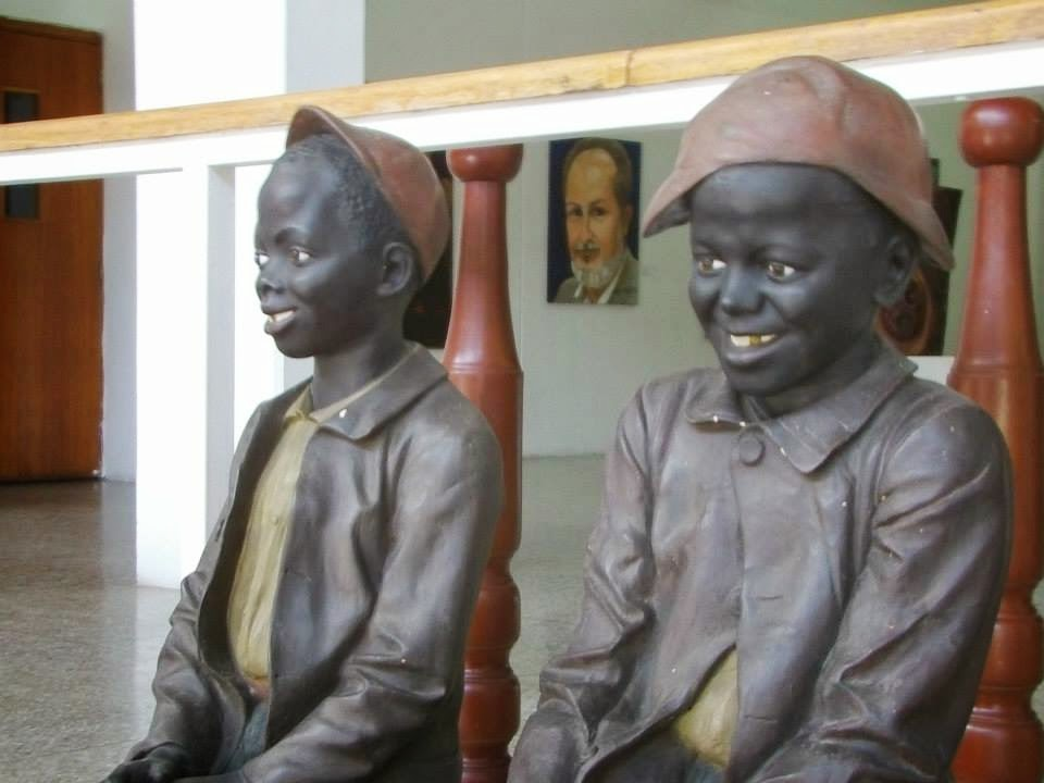 Negritos de Cerisola, esculturas ubicadas en el ingreso del Ateneo de Carúpano, estado Sucre, Venezuela